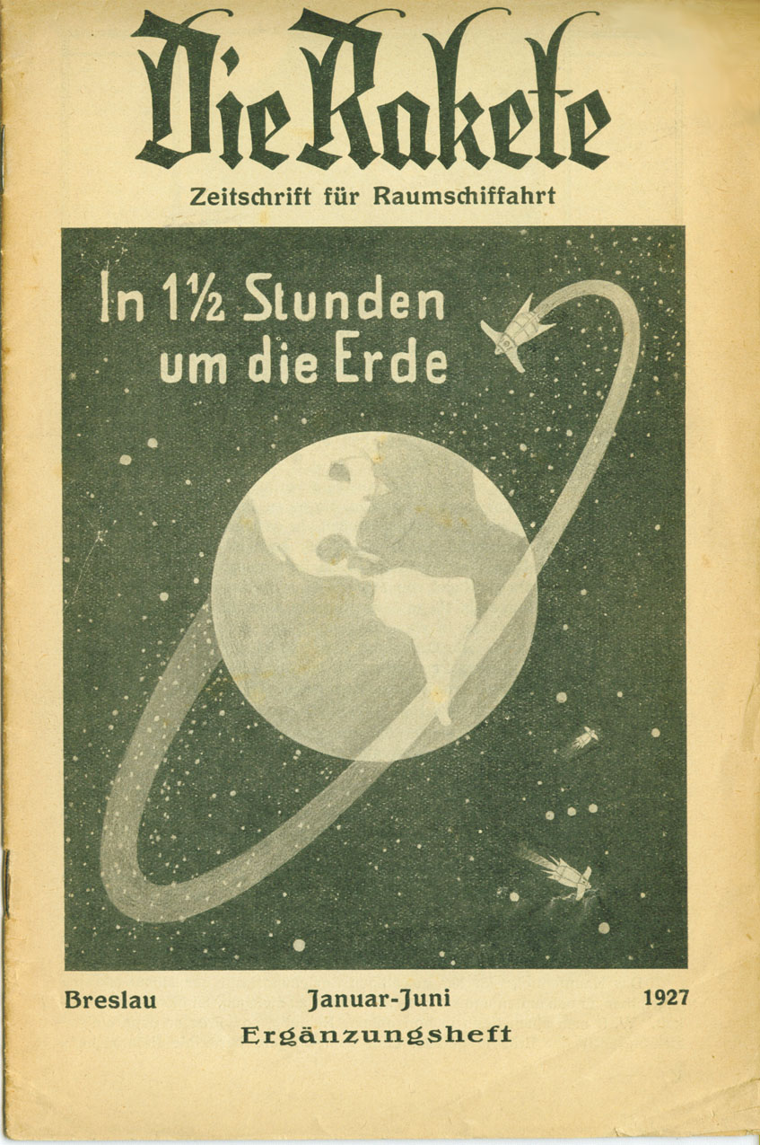 Titelbild des Ergänzungsbandes von "Die Rakete", 1927